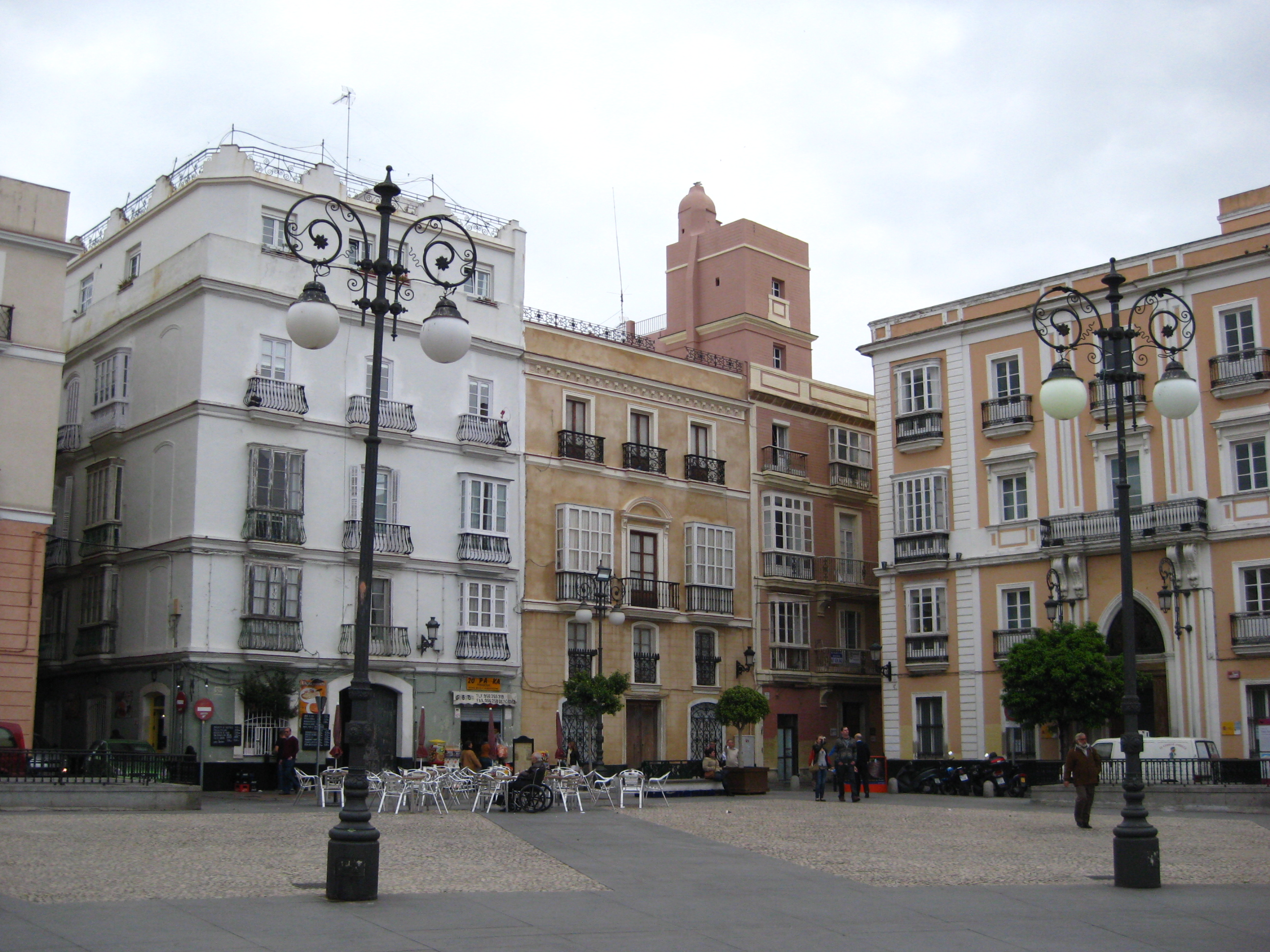 Plaza de San Antonio. Cádiz